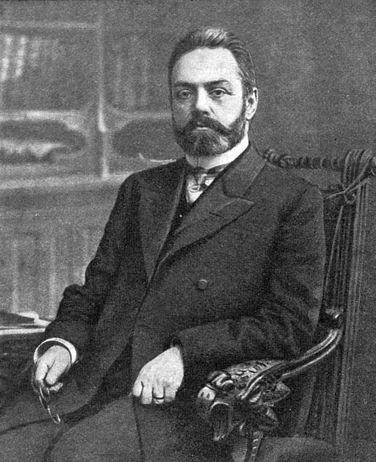 Гучков, Александр Иванович